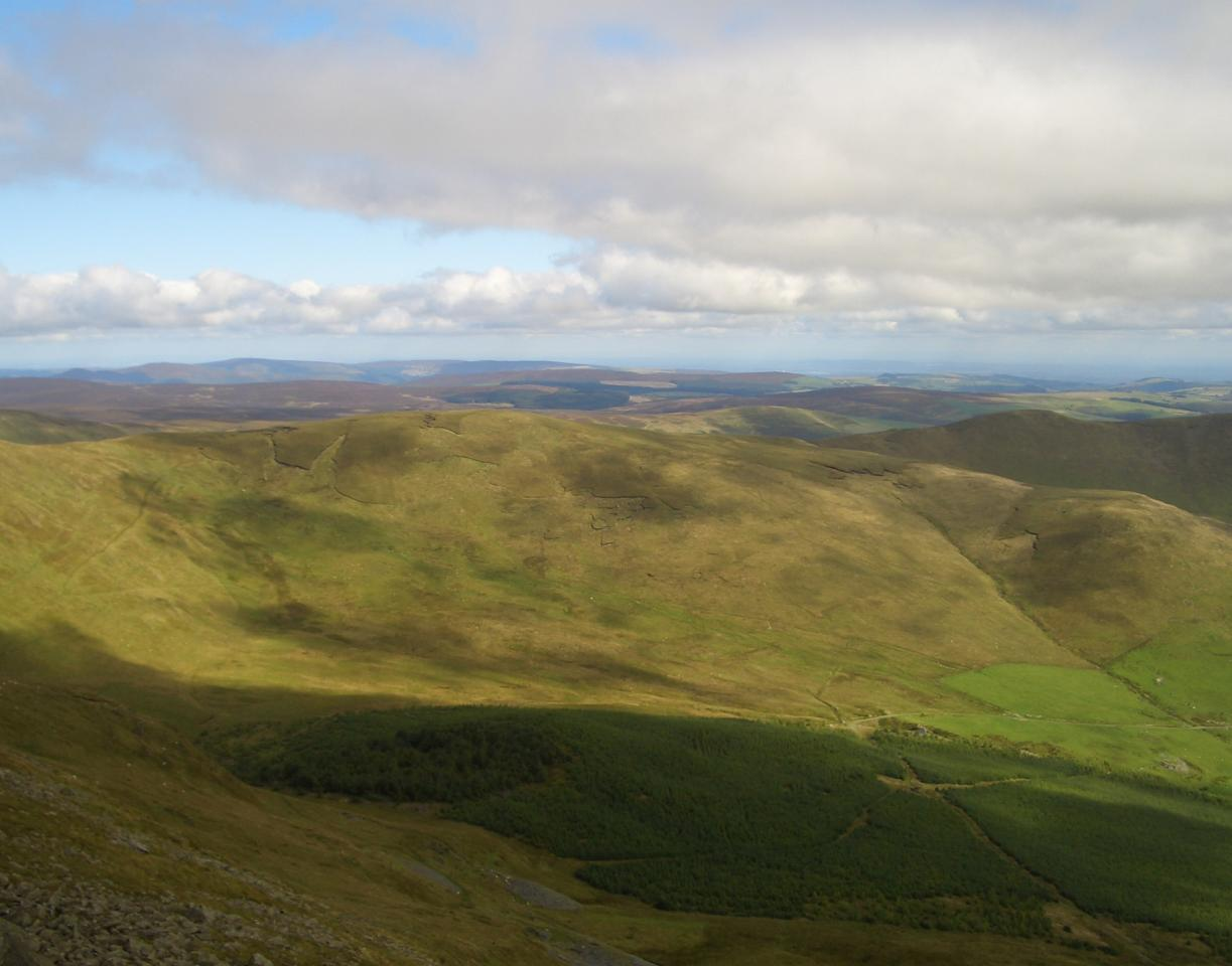 tomle